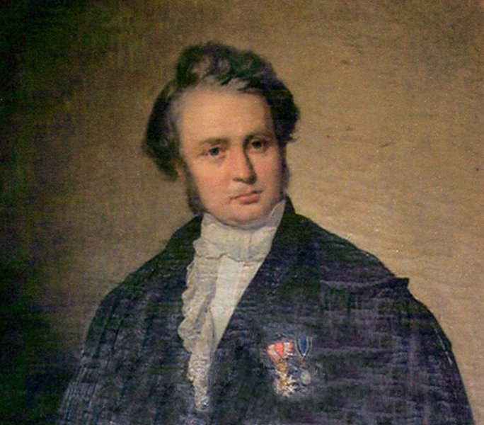 Ritratto di Andrea Ranzi, dipinto da Ferdinando Rondoni